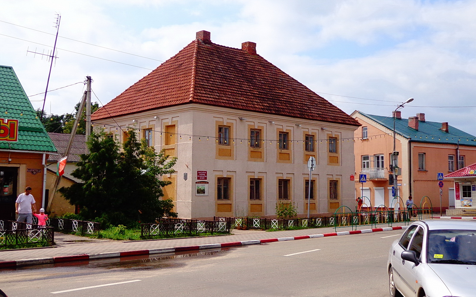 застройка площади Рынок, гостиница (XVIII век), сейчас краеведческий музей